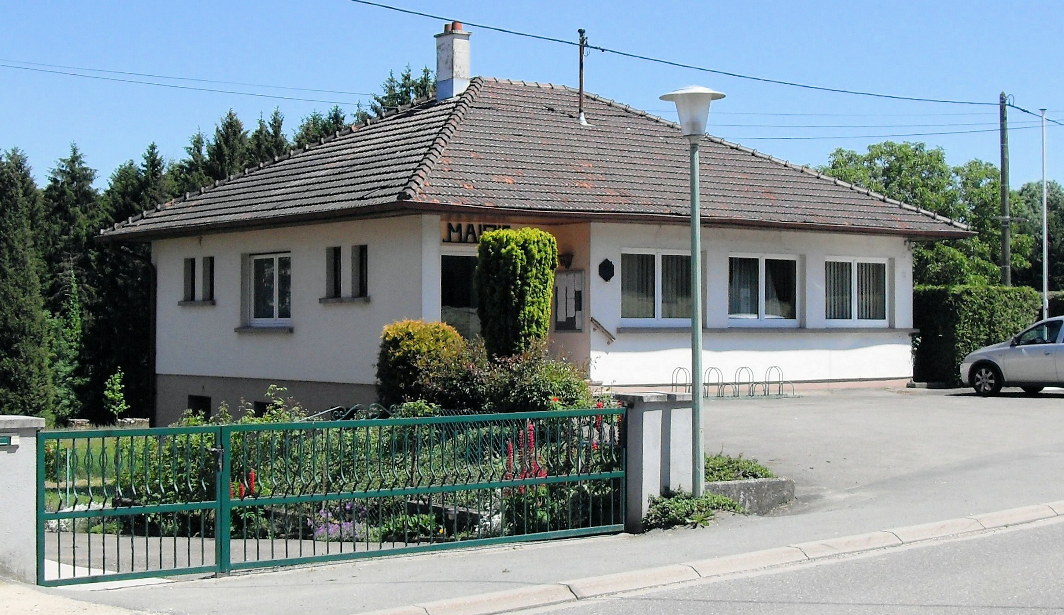 La mairie de Manspach